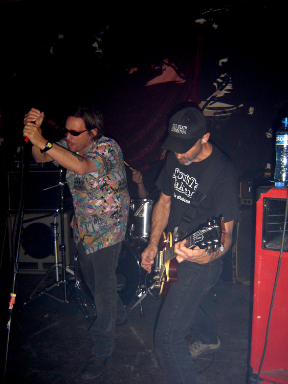 MDC at Bar en Boos, Leiden